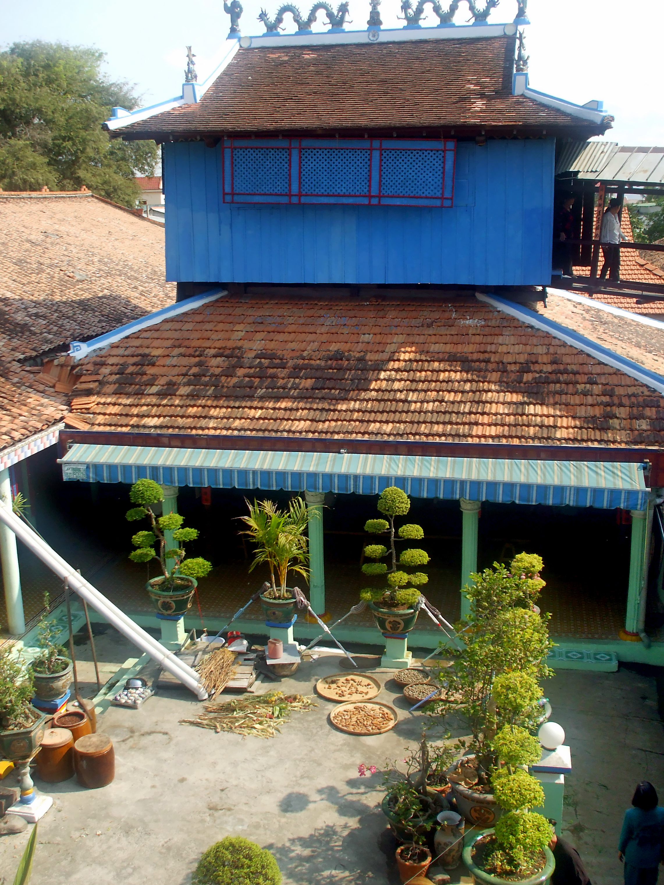 Một phần Nhà Lớn Long Sơn (Vũng Tàu), khi nhìn từ cao